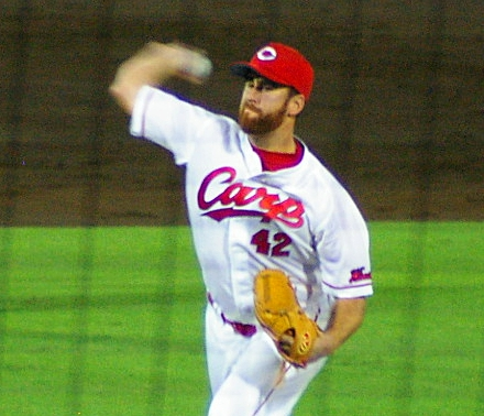 ヴィニー・チューク